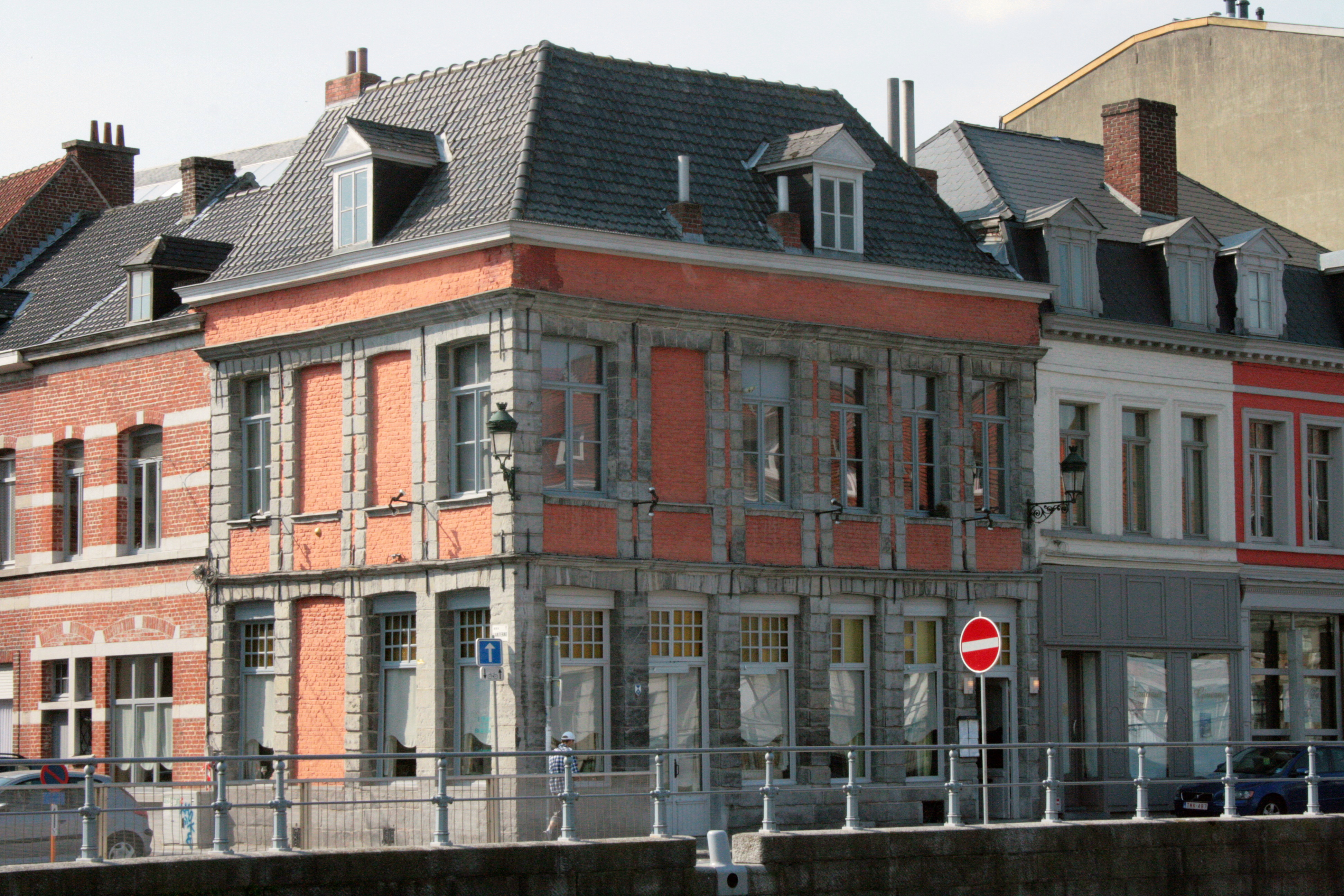 Maison louisquatorzième au coin du quai du Marché au Poisson et de la rue de la Lanterne, Tournai (Belgique)